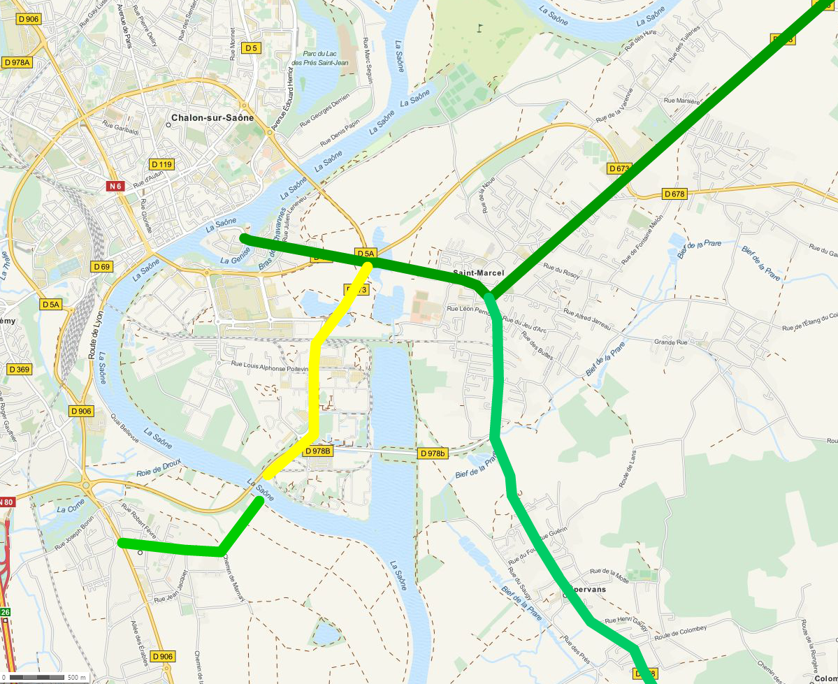 Karte der Römerstraßen in der Bresse - Zweig Chalon-sur-Saône nach Lux - gelb: genaue Straßenführung unbekannt Carte des voies romaines en Bresse - Branche de Chalon-sur-Saône à Lux - jaune: tracé exacte inconnu This map may be incomplete, and may contain errors. Don't rely solely on it for navigation.